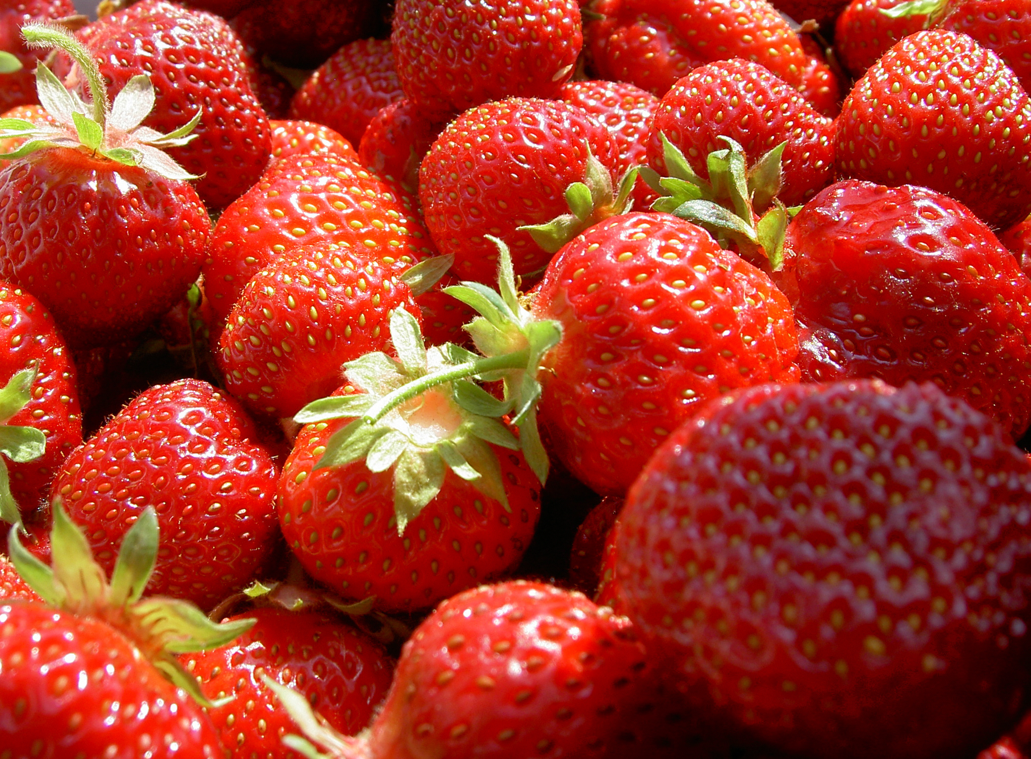 Reife Erdbeeren in einem Sammelgefäß (2005)